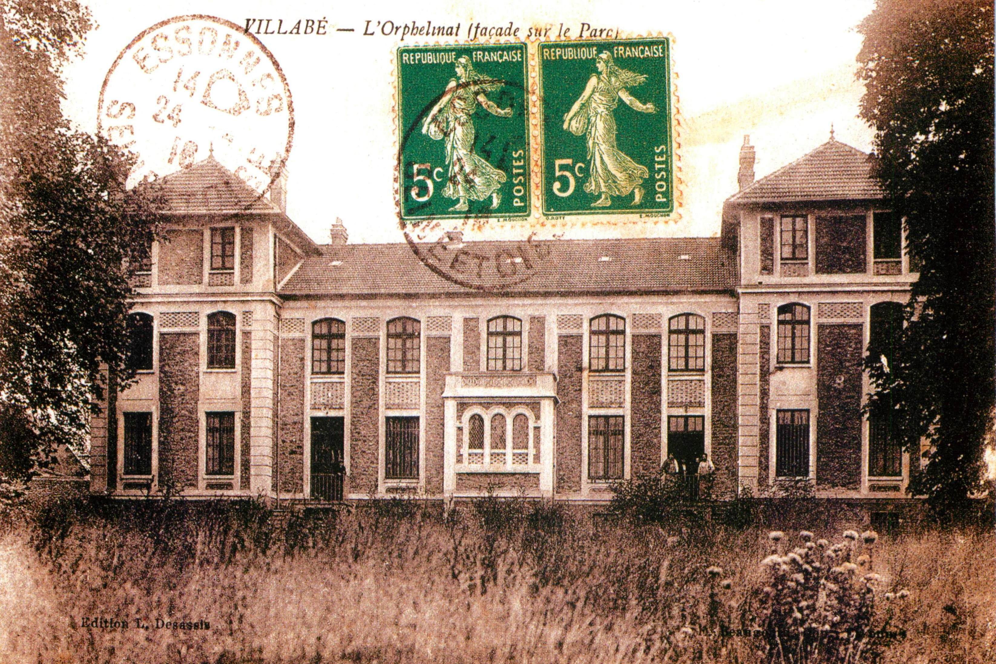 L'orphelinat de Villabé, vu du parc, transformé en école primaire en 1957 / Villabé / Essonne / France